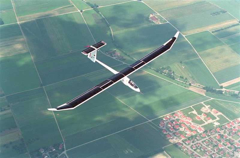 Icare II im Flug